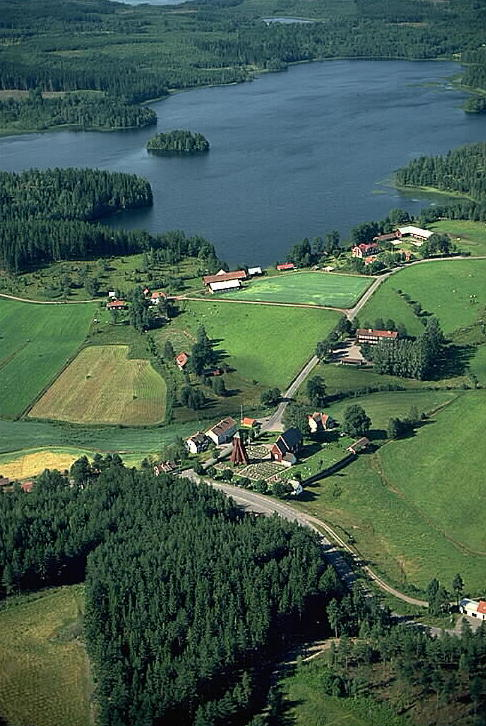 Motiv: Tidersrum Nyckelord: Flygbilder, Riksintressen Kategori: Kyrkby Tidersrum